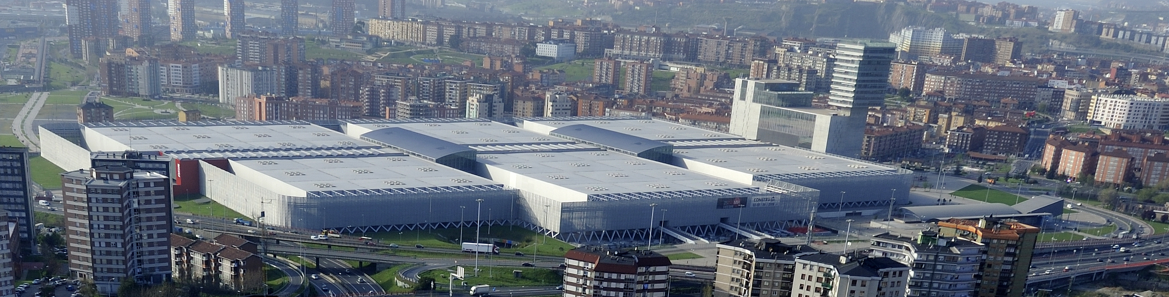 Bilbao Exhibition Centre BEC vista aérea